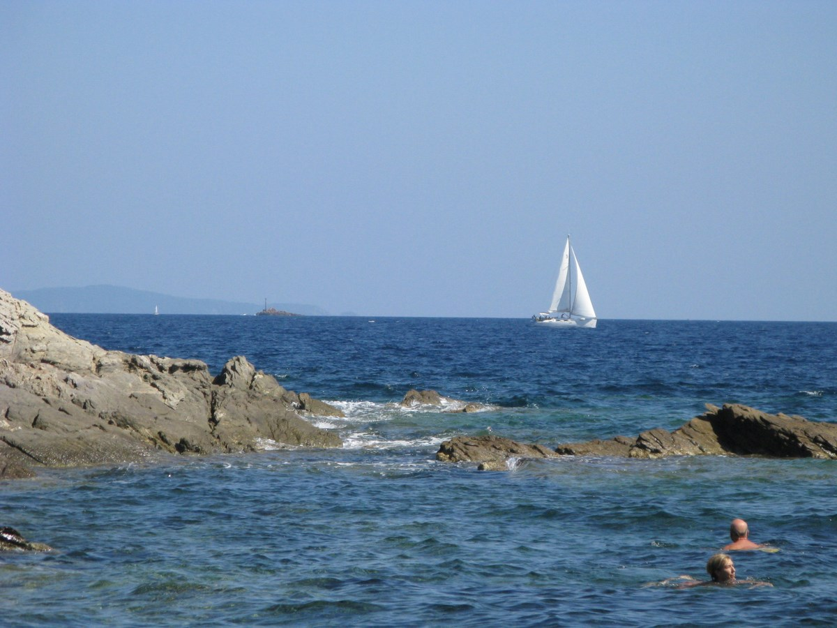 Aperçu du Cap Bénat - Bormes les Mimosas - France